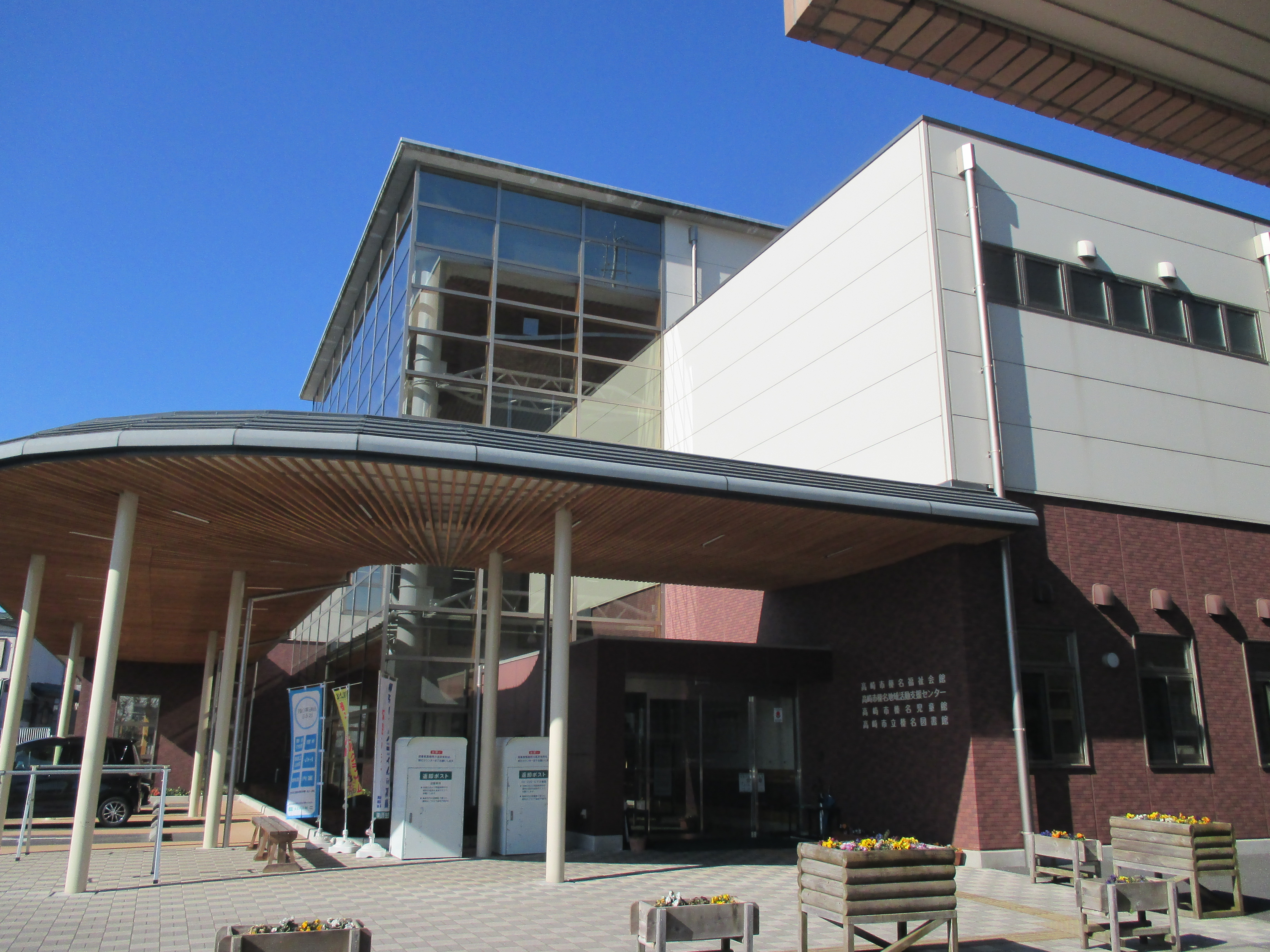 榛名図書館の外観